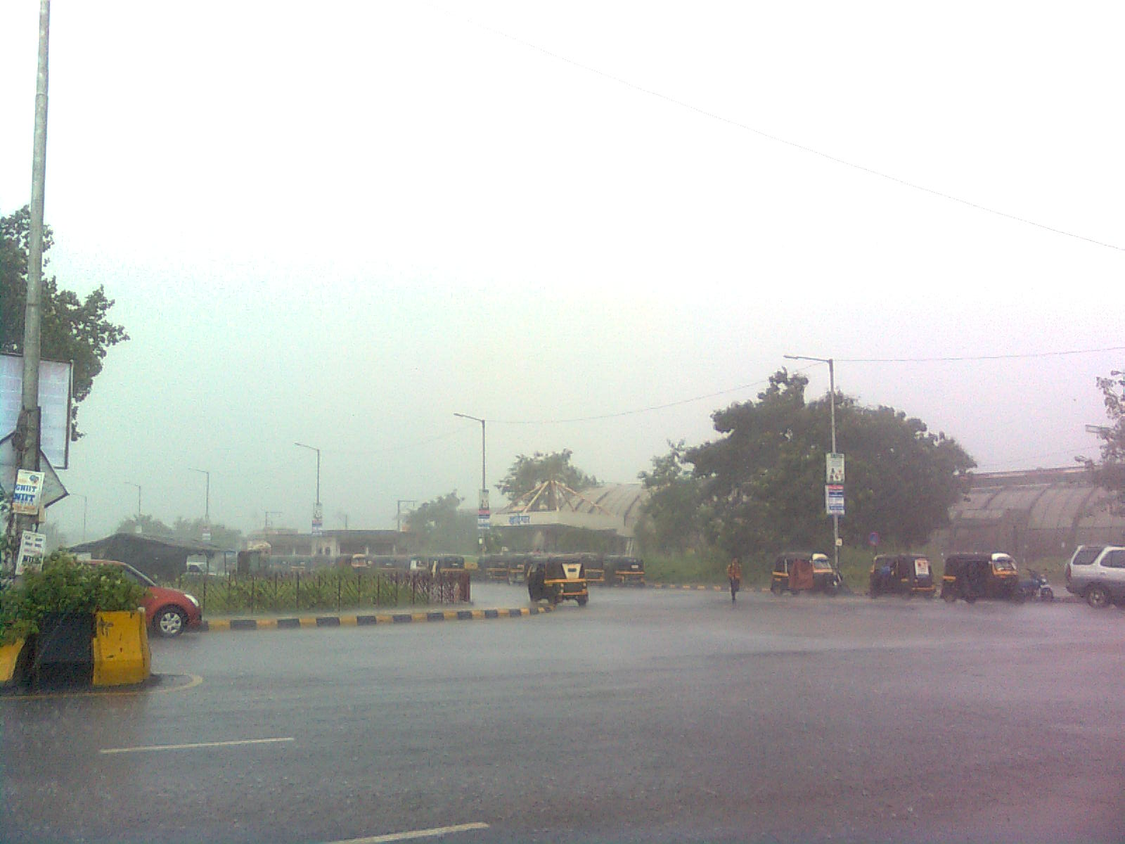 वर्षाकाल मे खान्देश्वर रेल्वे स्टेशन